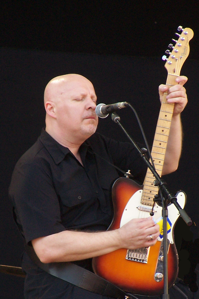 Belgian singer Frank Vander Linden, part of the group De Mens.